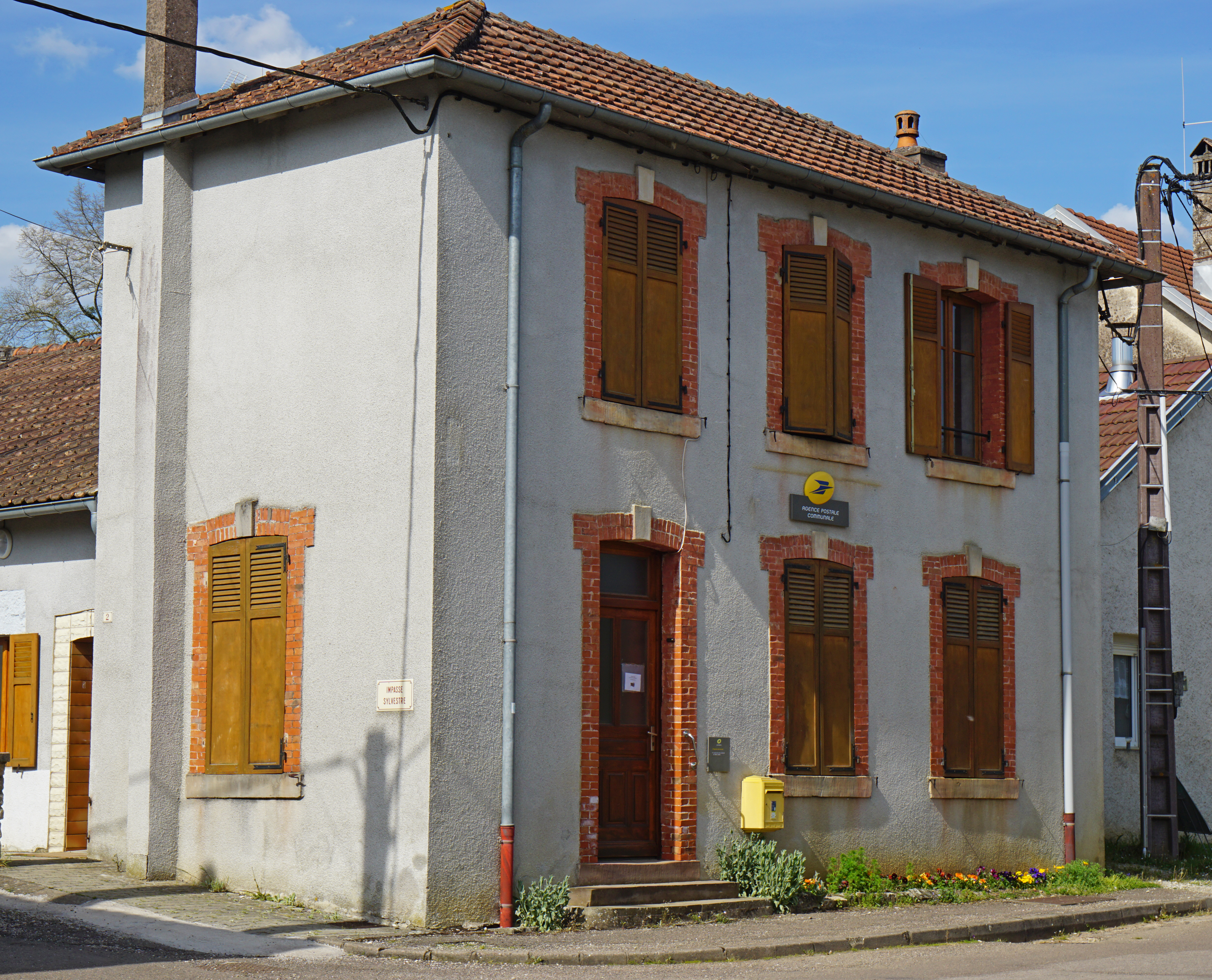 Poste de Mollans.